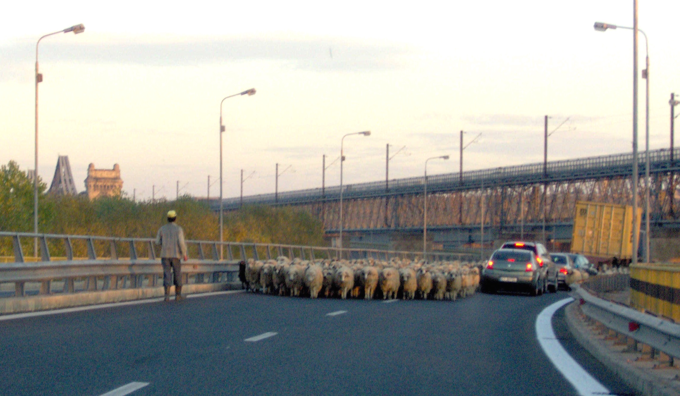 Autoroute Bucarest-Constanza à Fetesti